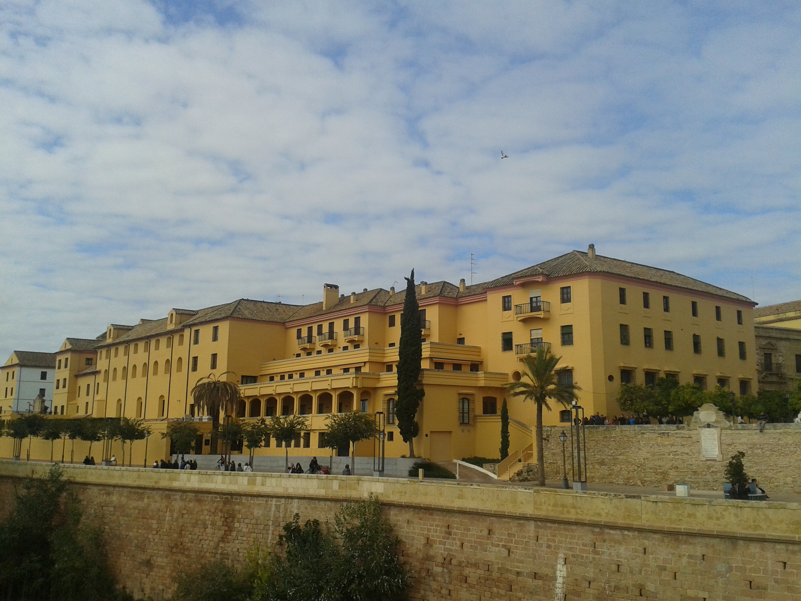 Cordoba